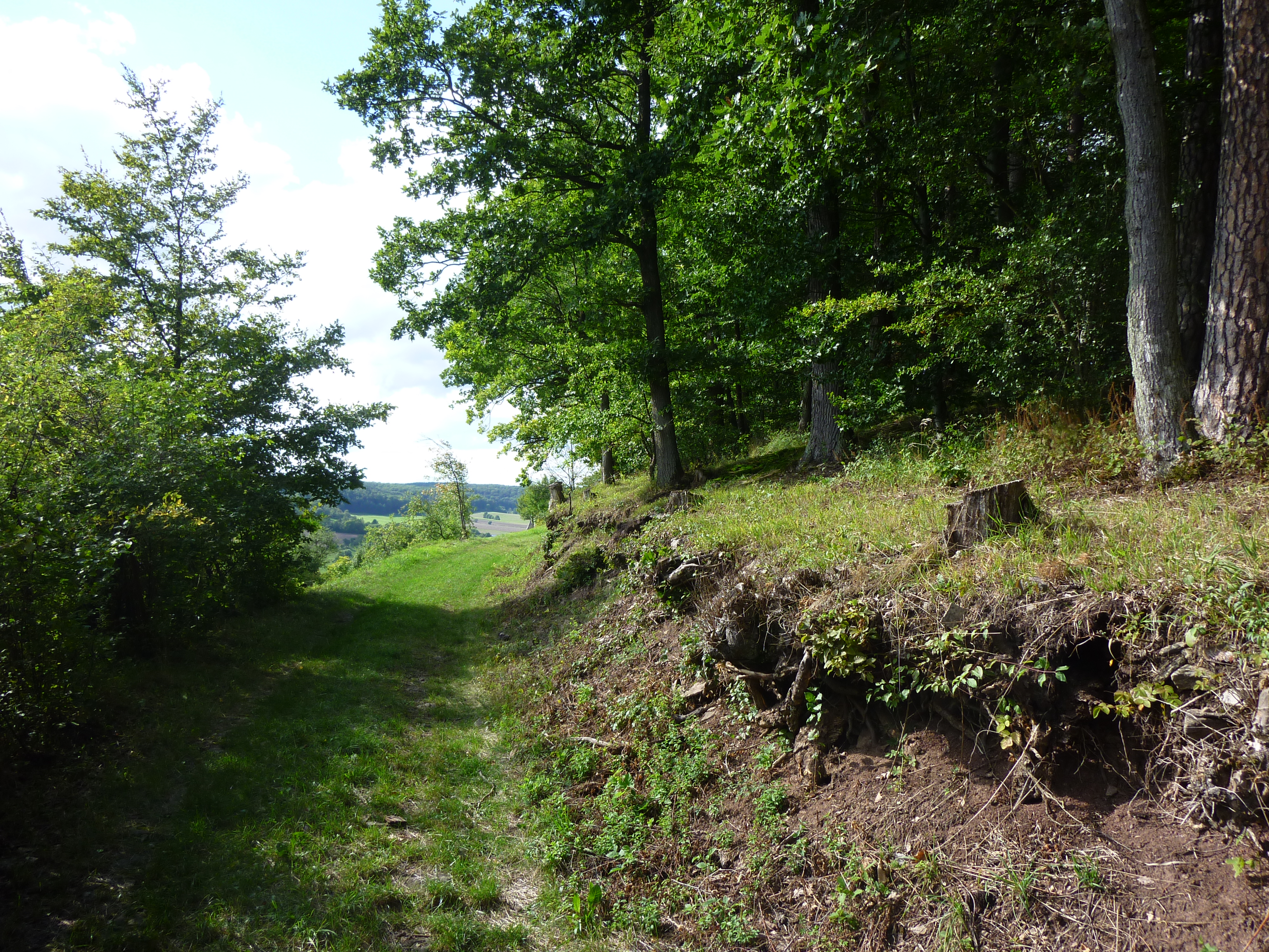 Waldrand "Unterer Berg"